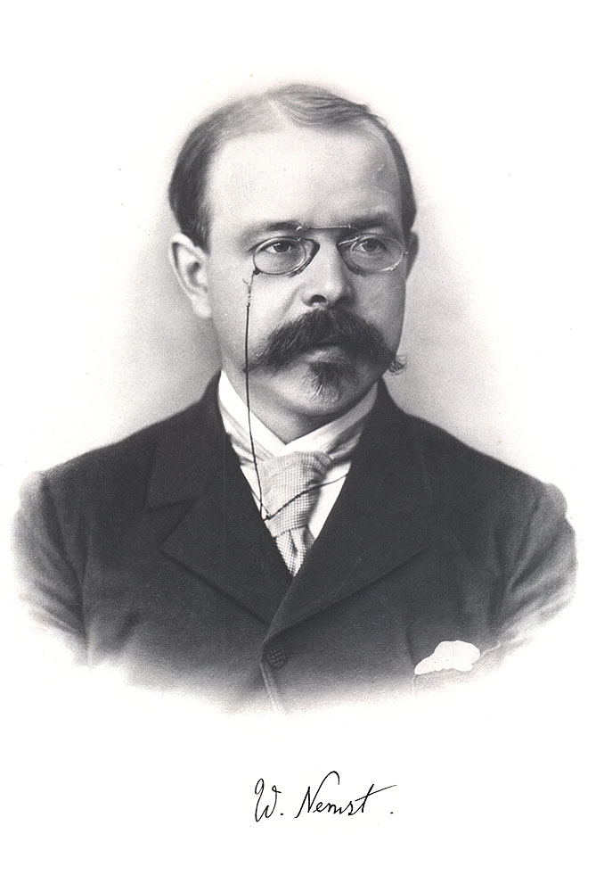 Walther Nernst (* 25. Juni 1864 in Briesen (Westpreußen); † 18. November 1941 in Zibelle (Oberlausitz)